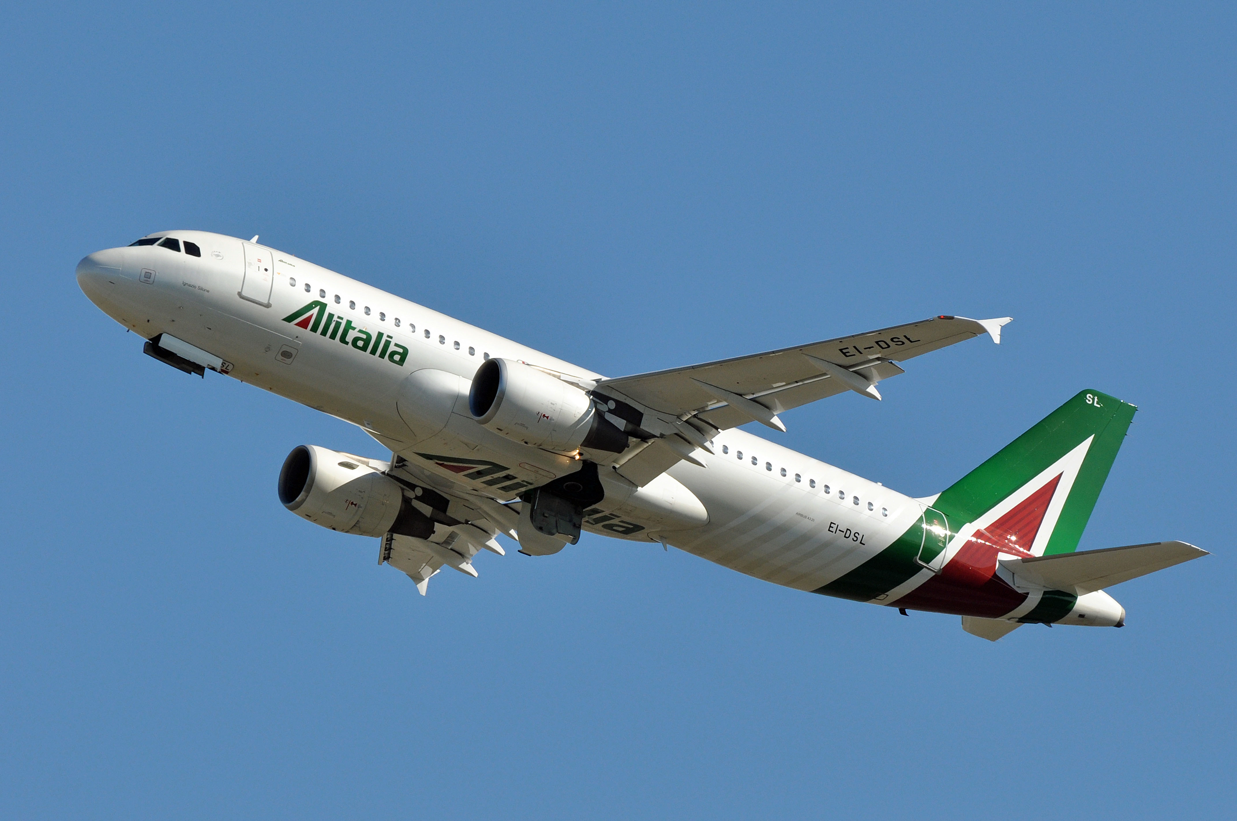 MSN 3343 A320-216 ALITALIA FCO AIRPORT EX AIR ONE